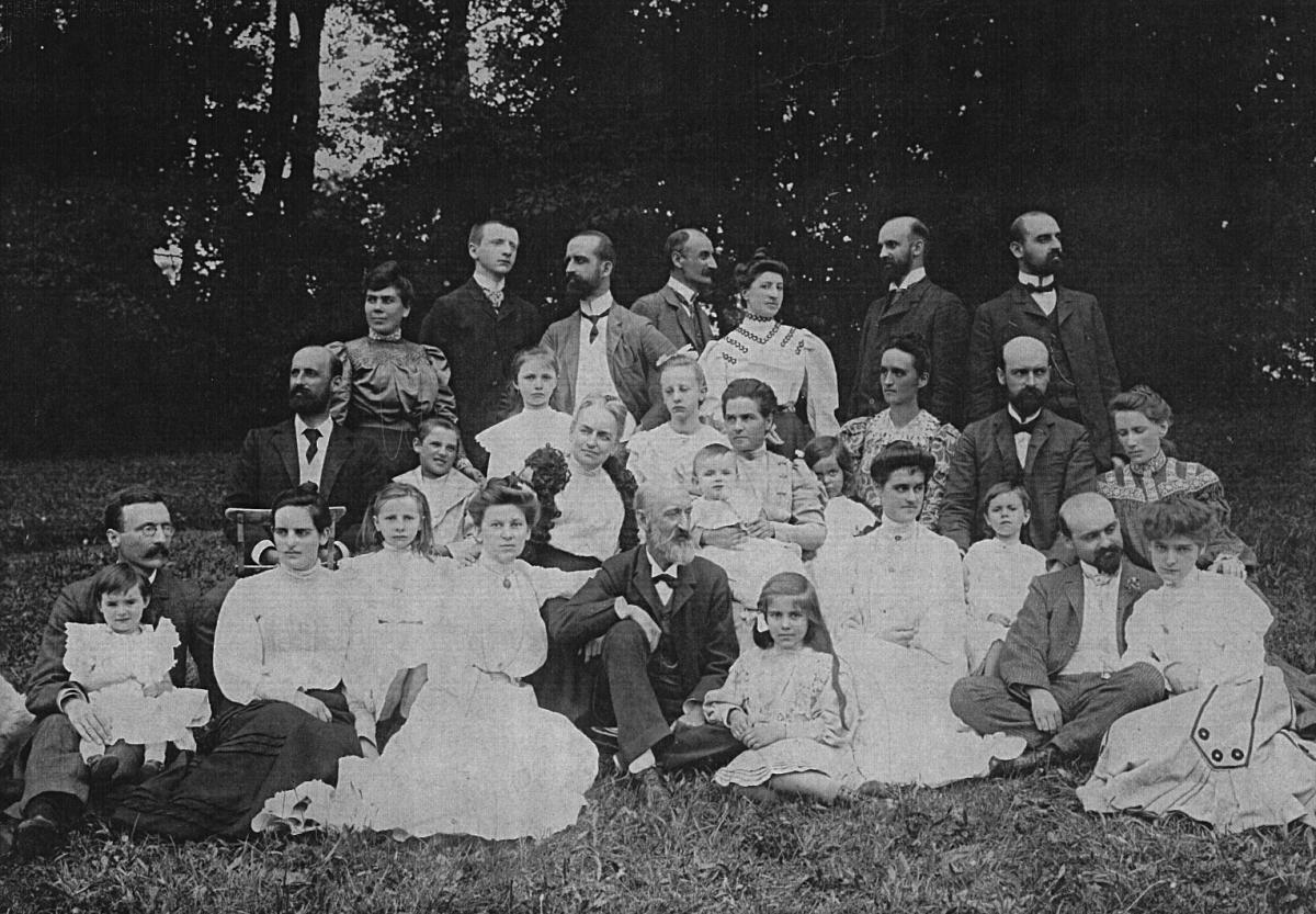 Герцен Александр Александрович и его 10 детей